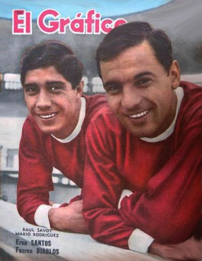 Portada de El Gráfico Nº 2274 del 08/05/1963 con Savoy y Mario Rodriguez